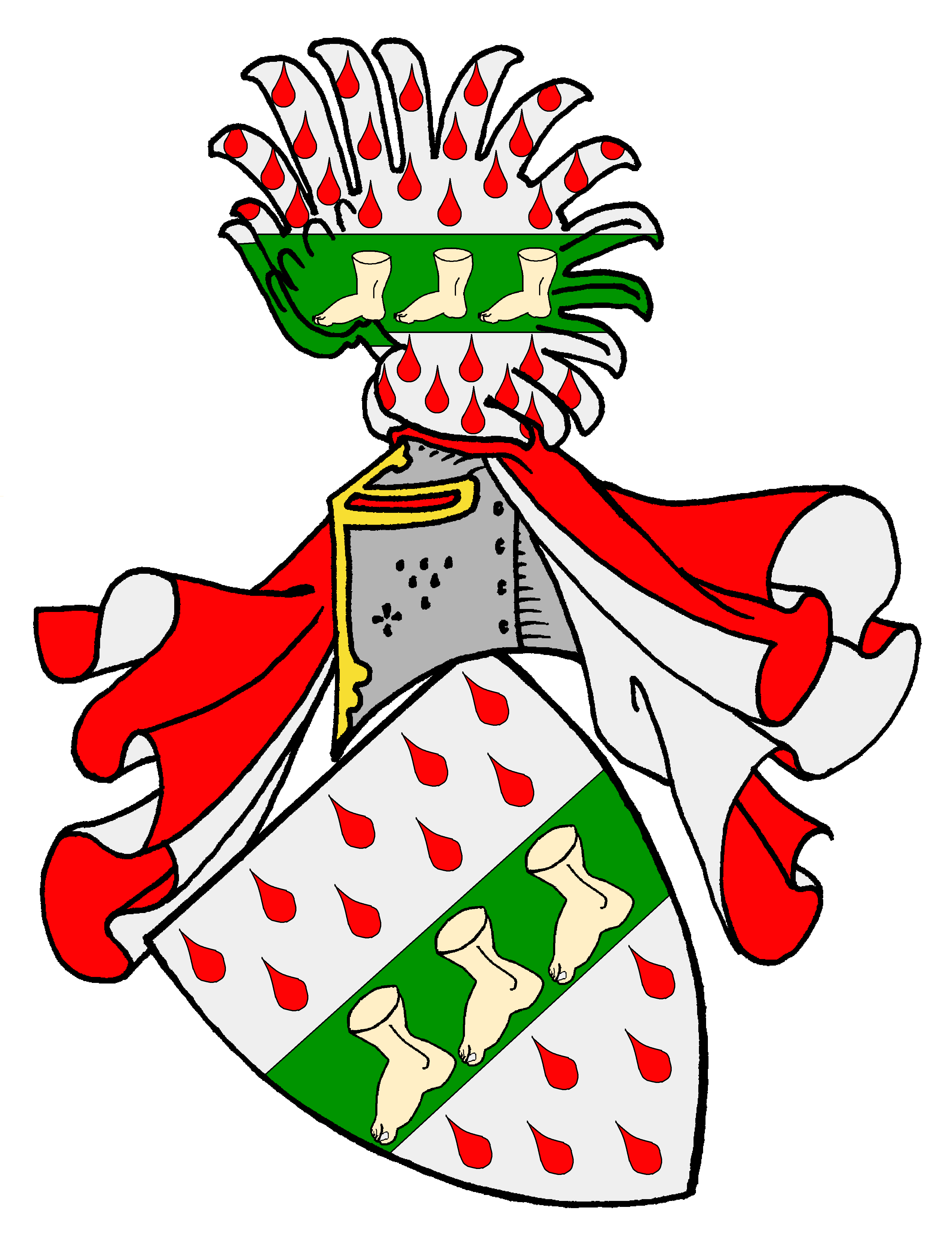 Stammwappen der Barfus, einer deutschen Uradelsfamilie der Altmark.